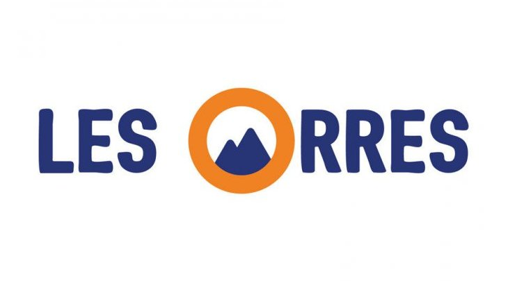 Le logo de la station de sports d'hiver des Orres.